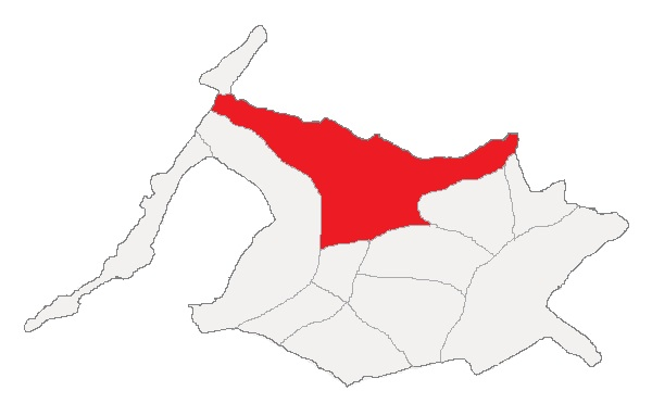 Strøket Nedre Rønvik innenfor bydelen Rønvika.